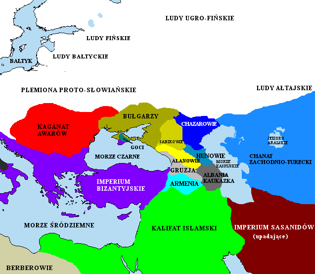 Obszar stepu pontyjskiego ok. 650 A.D. z polskimi nazwami geograficznymi i politycznymi.